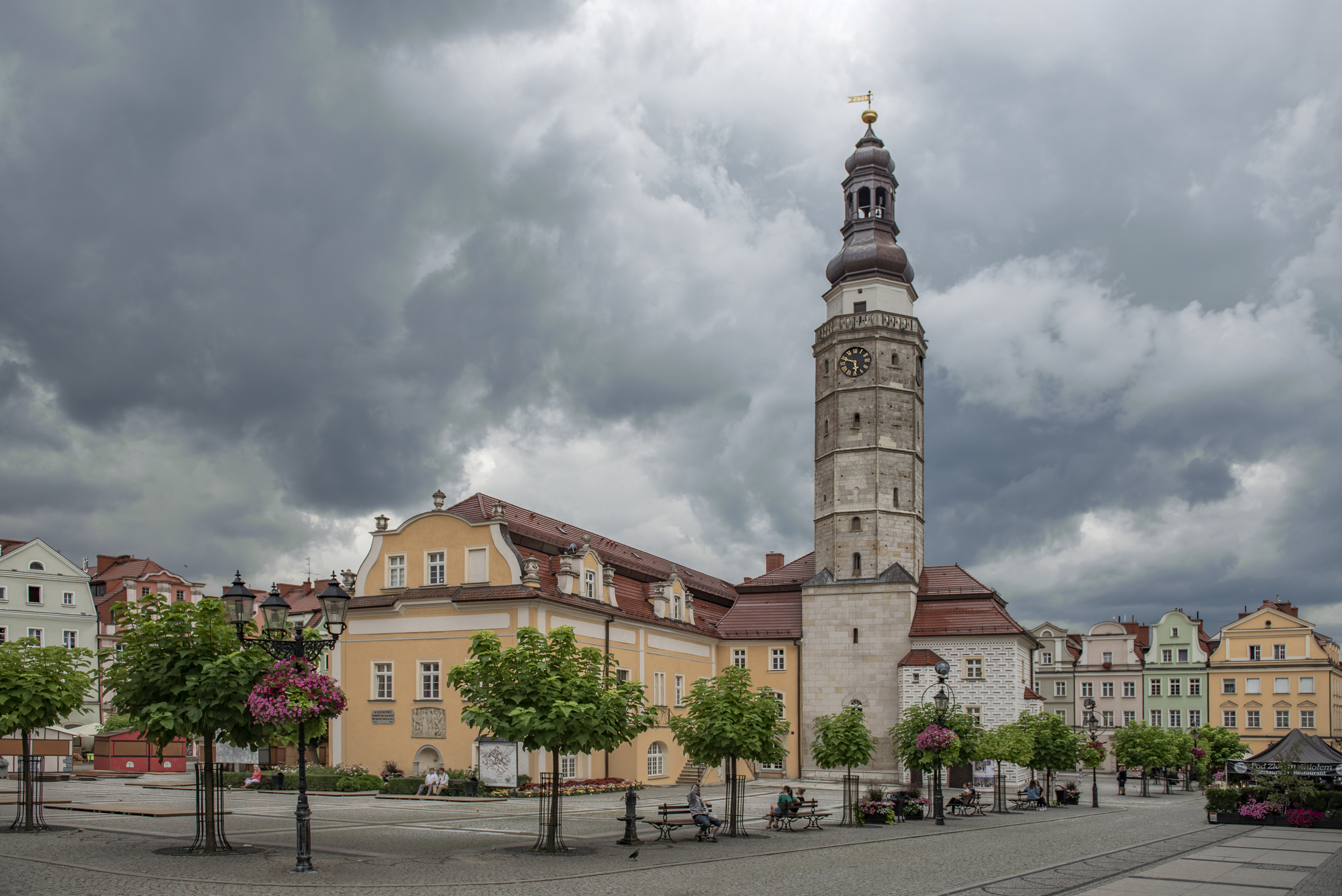 Bolesławiec, Ratusz w Bolesławcu